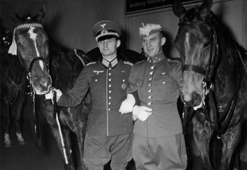 Oppeln-Bronikowski und Peter Jensen Schluss des Reit und Fahrturniers in der Deutschlandhalle "Um den Preis des Oberbefehlshabes des Heeres" Dressur Wettkampf (Kür) Die beiden 1. Sieger Rittm. v. Oppeln "Gimpel" (links) und Rittm. P. Jensen "His Ex" (Dänemark) [Herausgabedatum: 2. Febr. 1936] Abgebildete Personen: Oppeln-Bronikowski, von: Rittmeister, Heer, Dressurreiter, Olympiateilnehmer 1936, Deutschland Jensen, Peter: Rittmeister, Dänemark